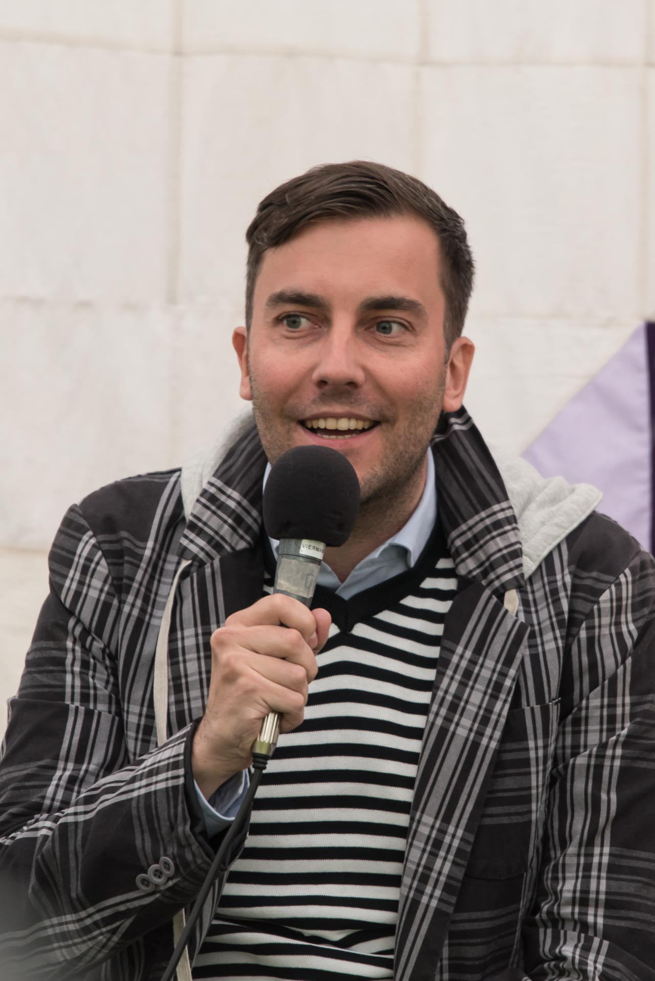 Roald Johannson teisel Arvamusfestivalil Narvas. Arutelu teemaks "Ida­-Viru meediapeeglis – ilus või kole?".